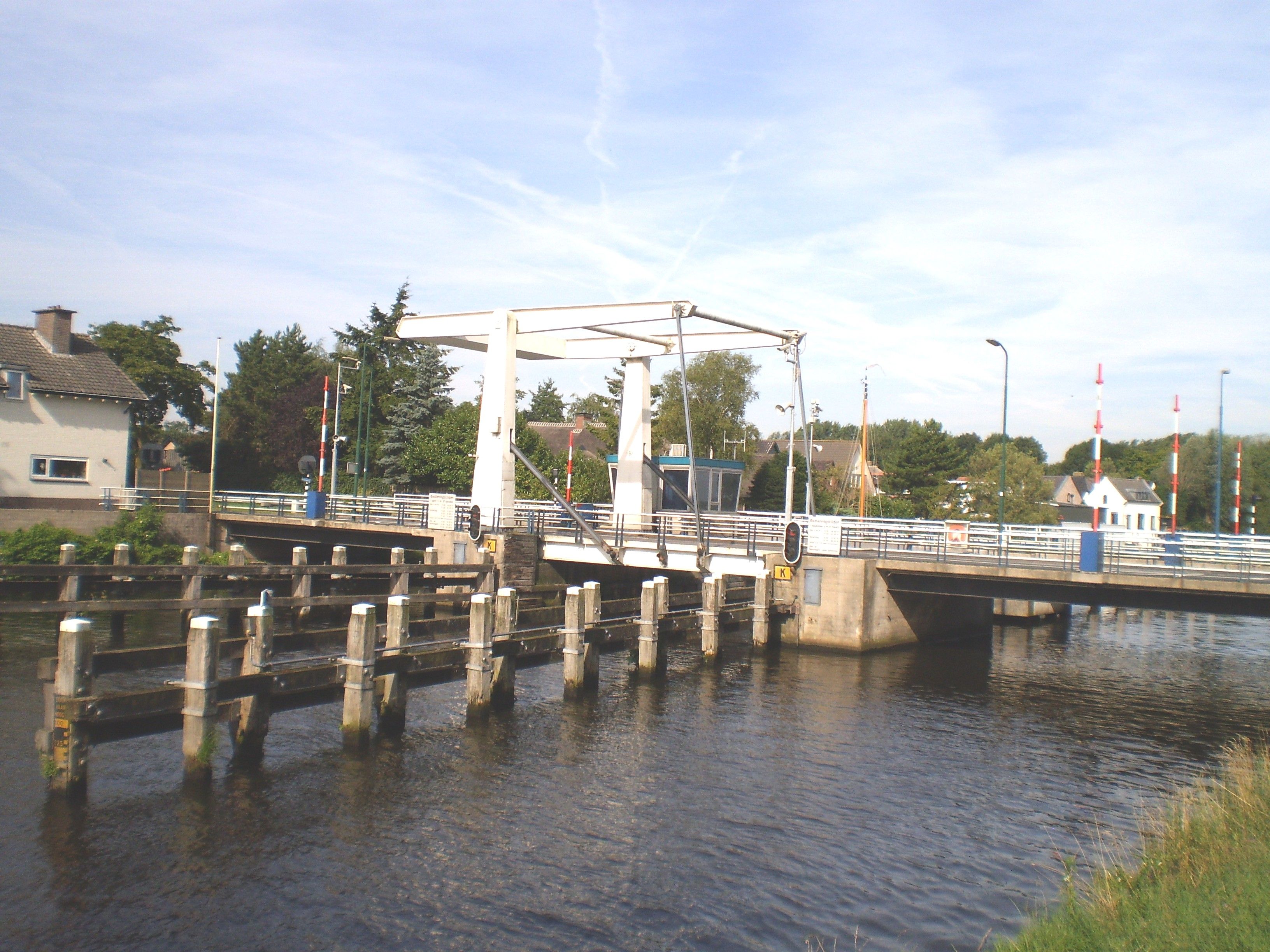 Iembrêge